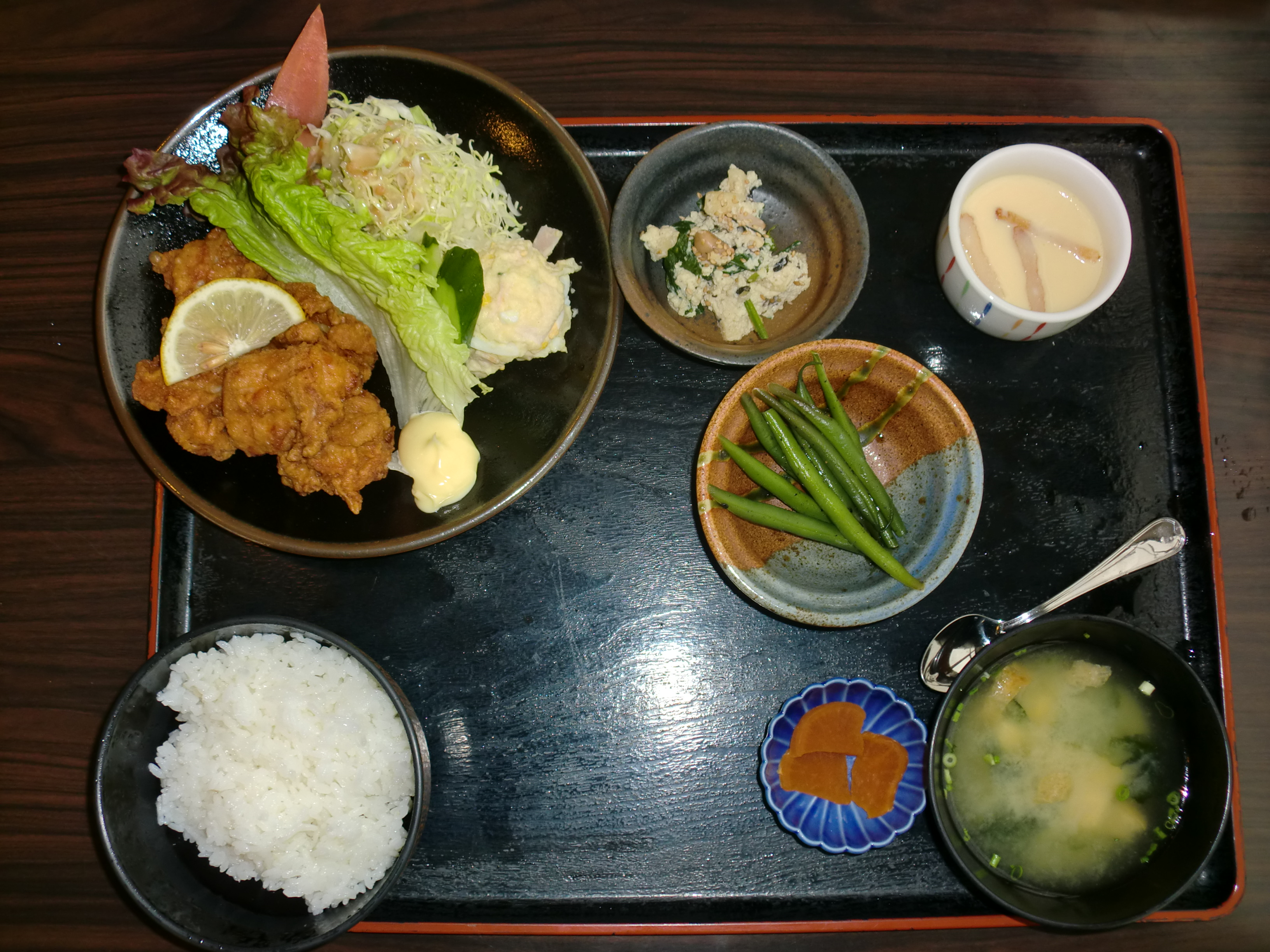 熊本県水俣市にあるエムズシティスカイレストランエムズで食べたからあげ定食